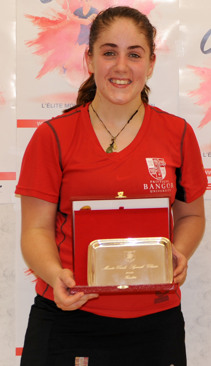 finale Monte-Carlo Squash Classic 2018